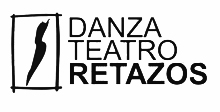 Logo retazos 2